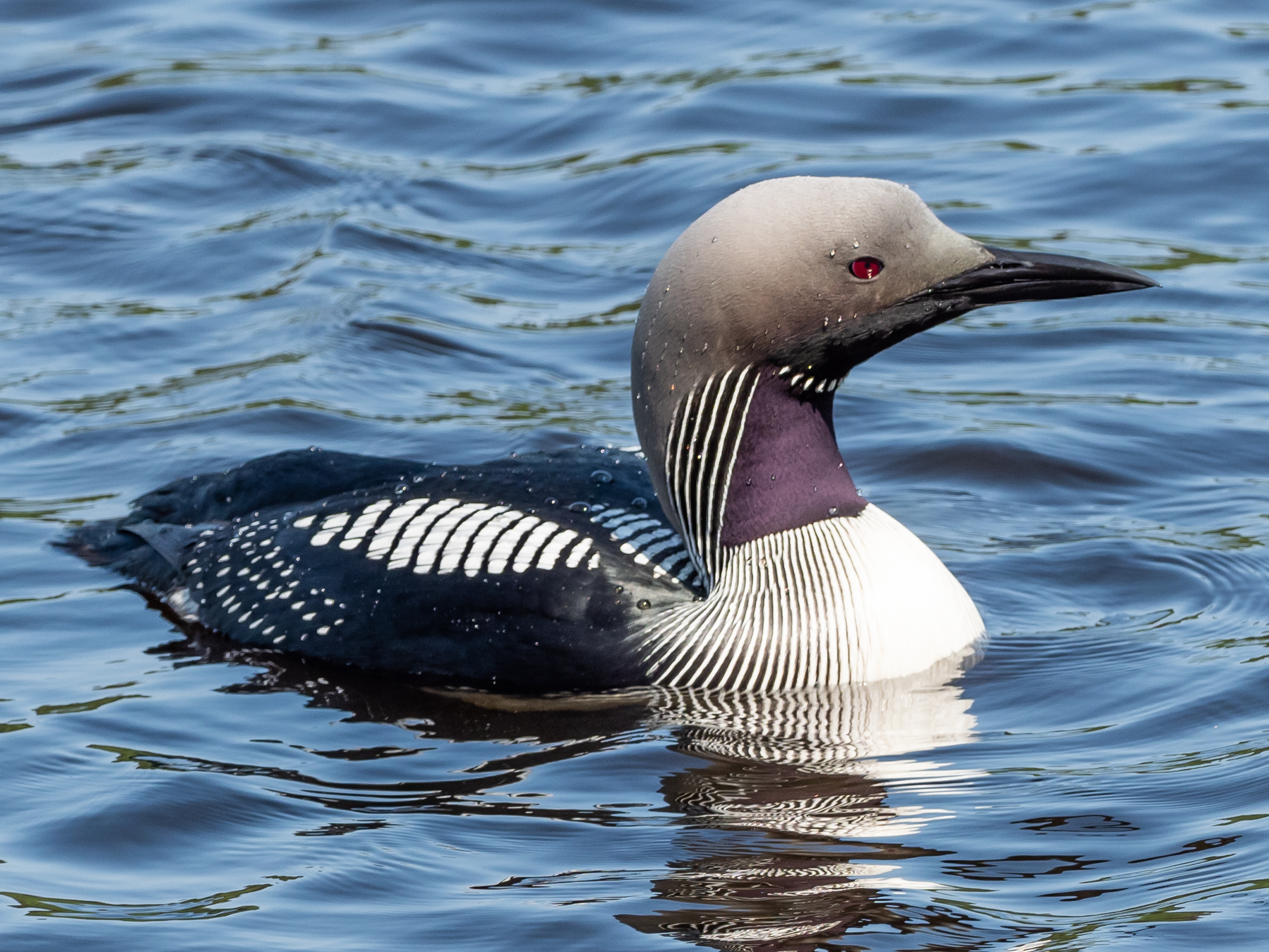 Bogesund, Vaxholm, Stockholm, Sweden, June 2019